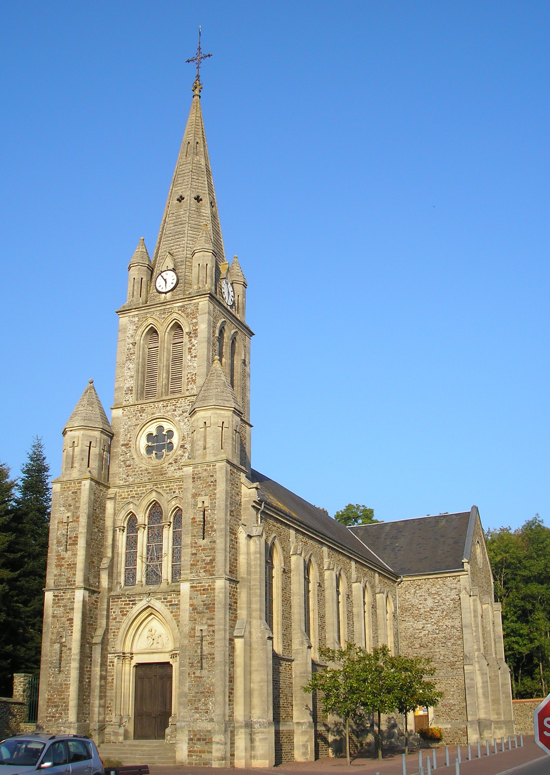 Canisy (Normandie, France). L'église Saint-Pierre.